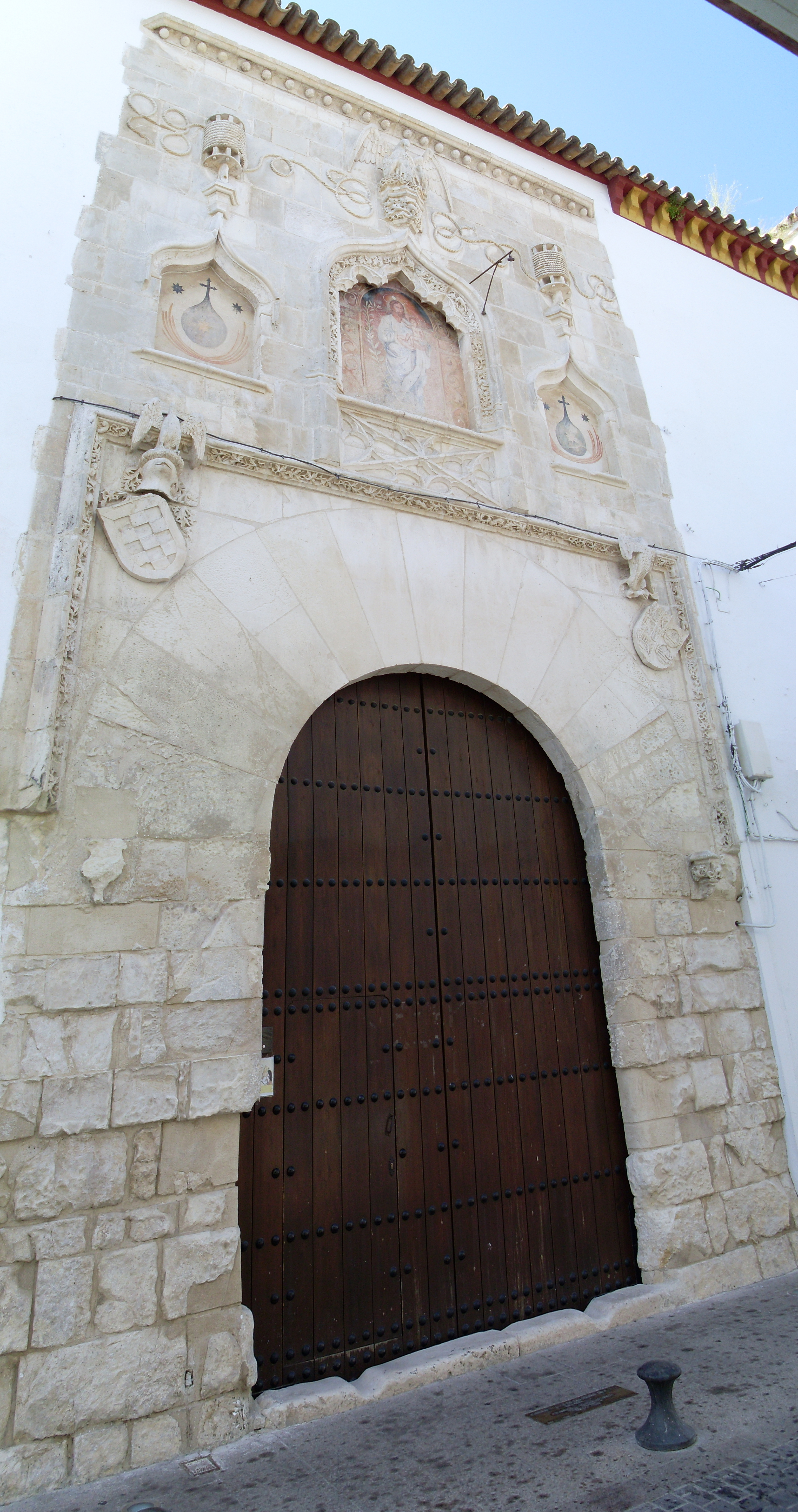 Portada del palacio del Conde de Palma (Écija).